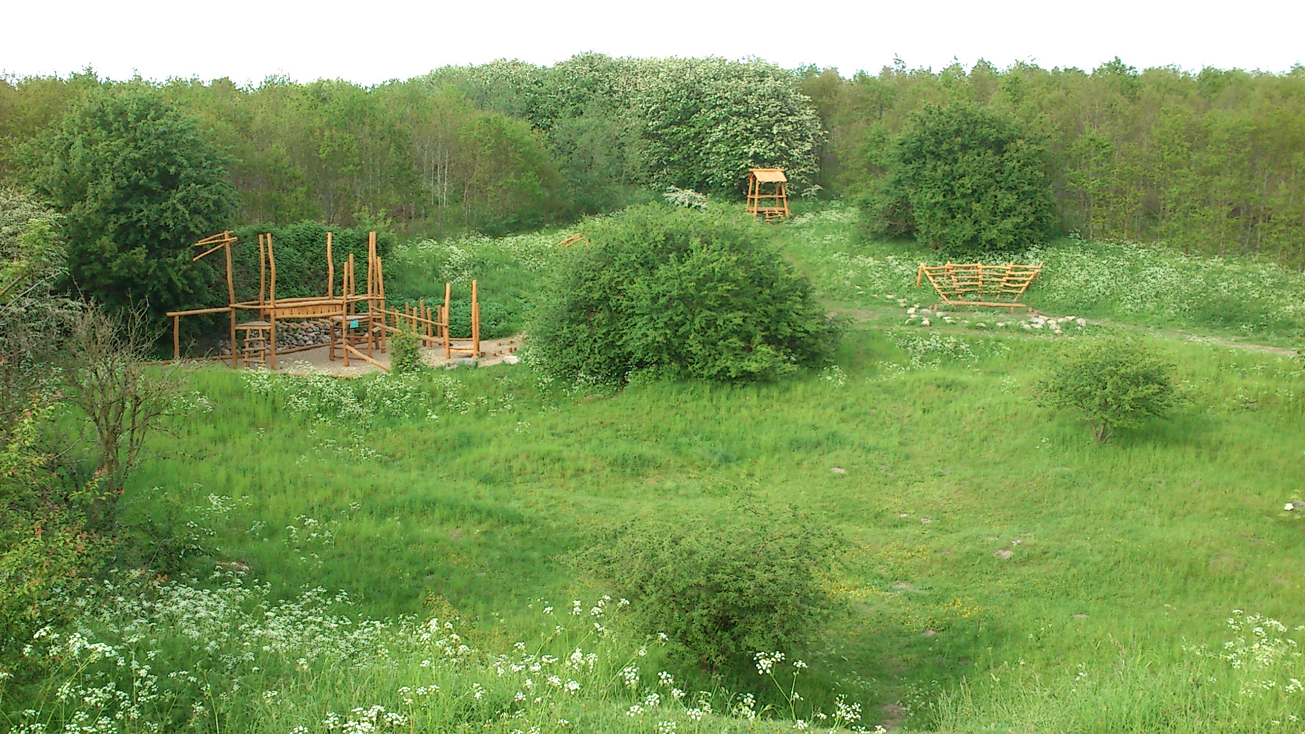 Kimbrerdalen. Legepladsen er anlagt i en nedlagt grusgrav, som der er flere af i den nye del af Lisbjerg Skov. Indviet 1. maj 2014 af Aarhus Kommune ved rådmand Kristian Würtz (S). Svævebanen mm. ligger til højre for billedet her.